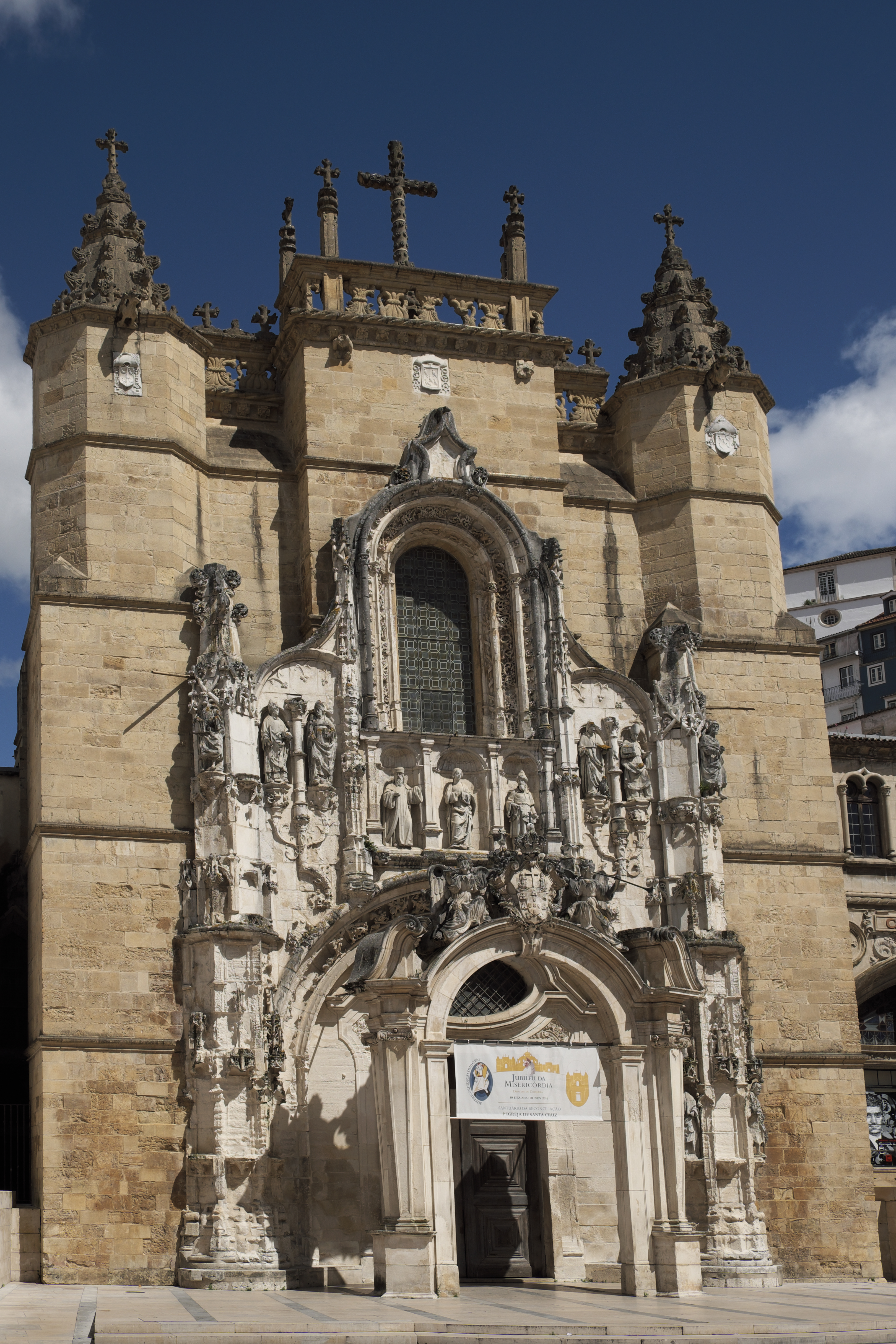 Portalfassade der ehemaligen Augustinerchorherrenstiftskirche Santa Cruz in Coimbra (Portugal)